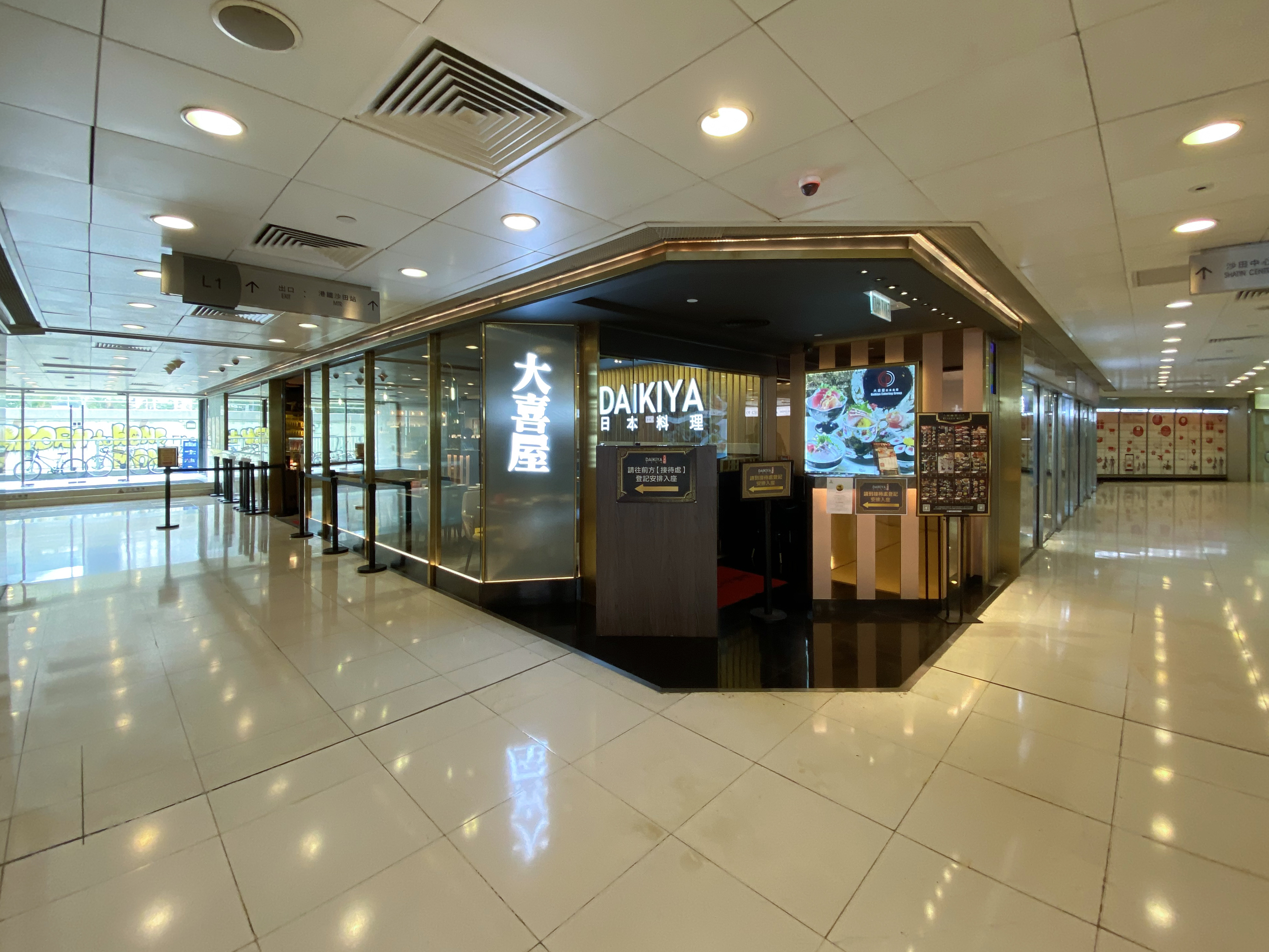 Daikiya in Shatin Plaza